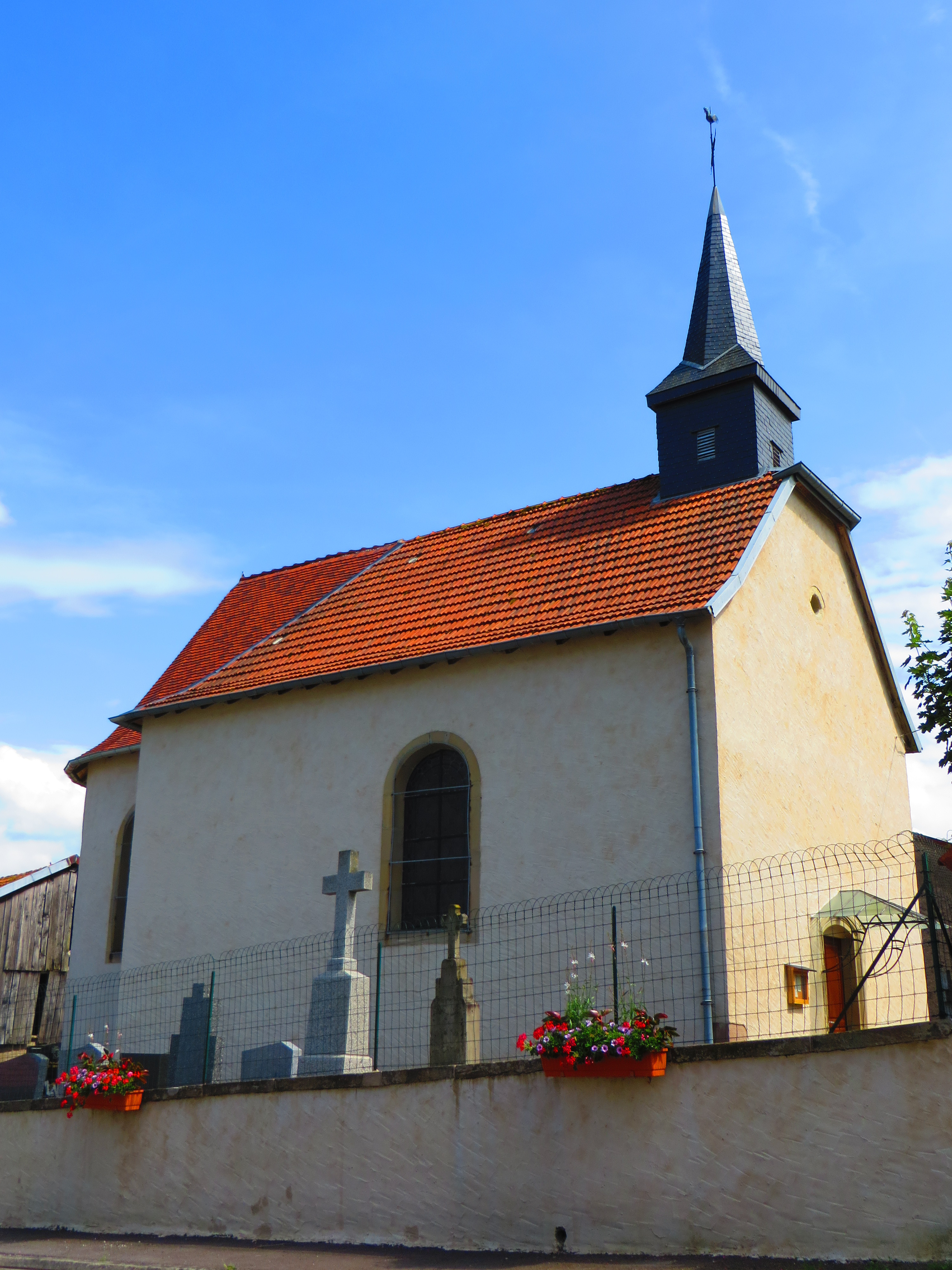 Laneuveville Lorquin eglise